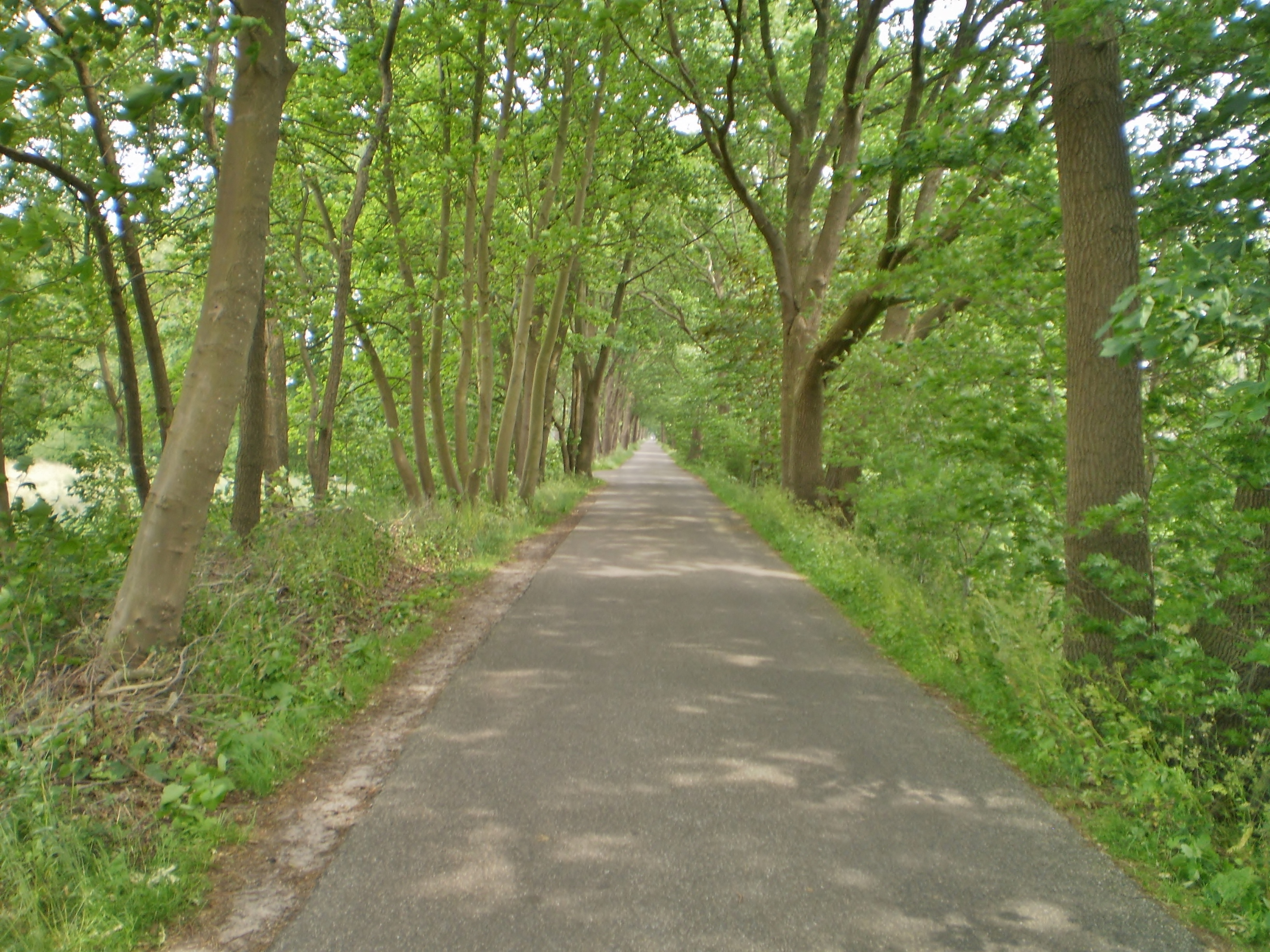 Graaf Floris V Weg, vanuit Egelshoek, richting Hollandsche Rading